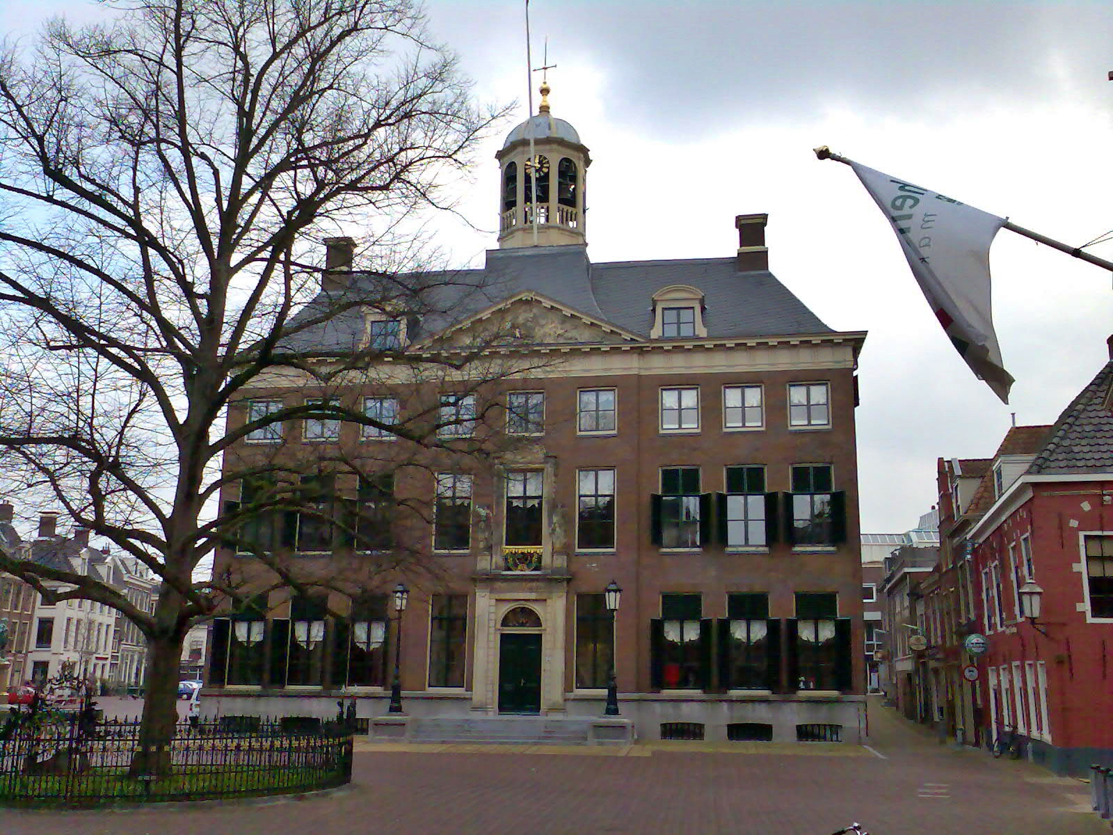 Leeuwarden, Rathaus